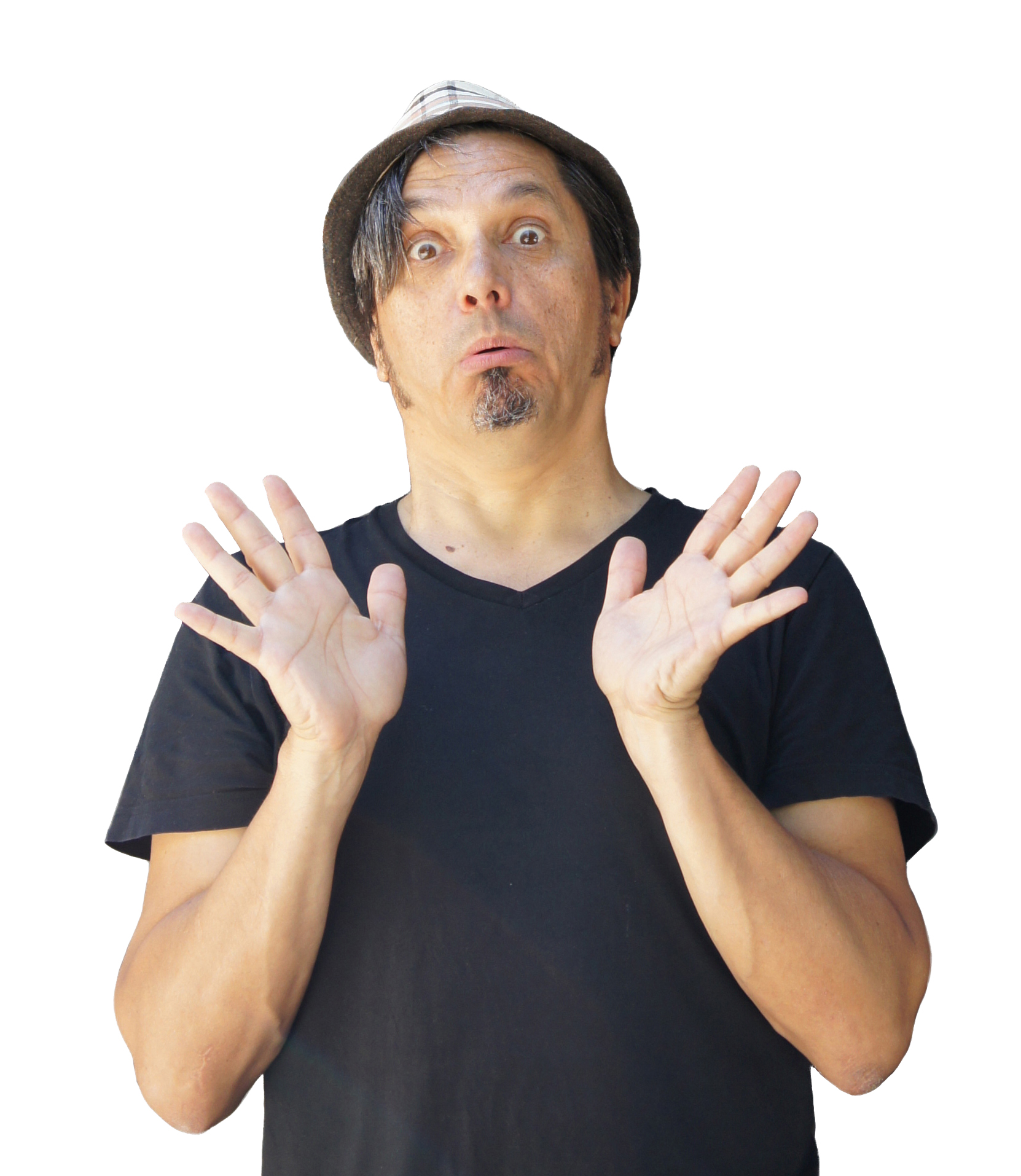 Muhsin - Der stattlich geprüfte Deutsche